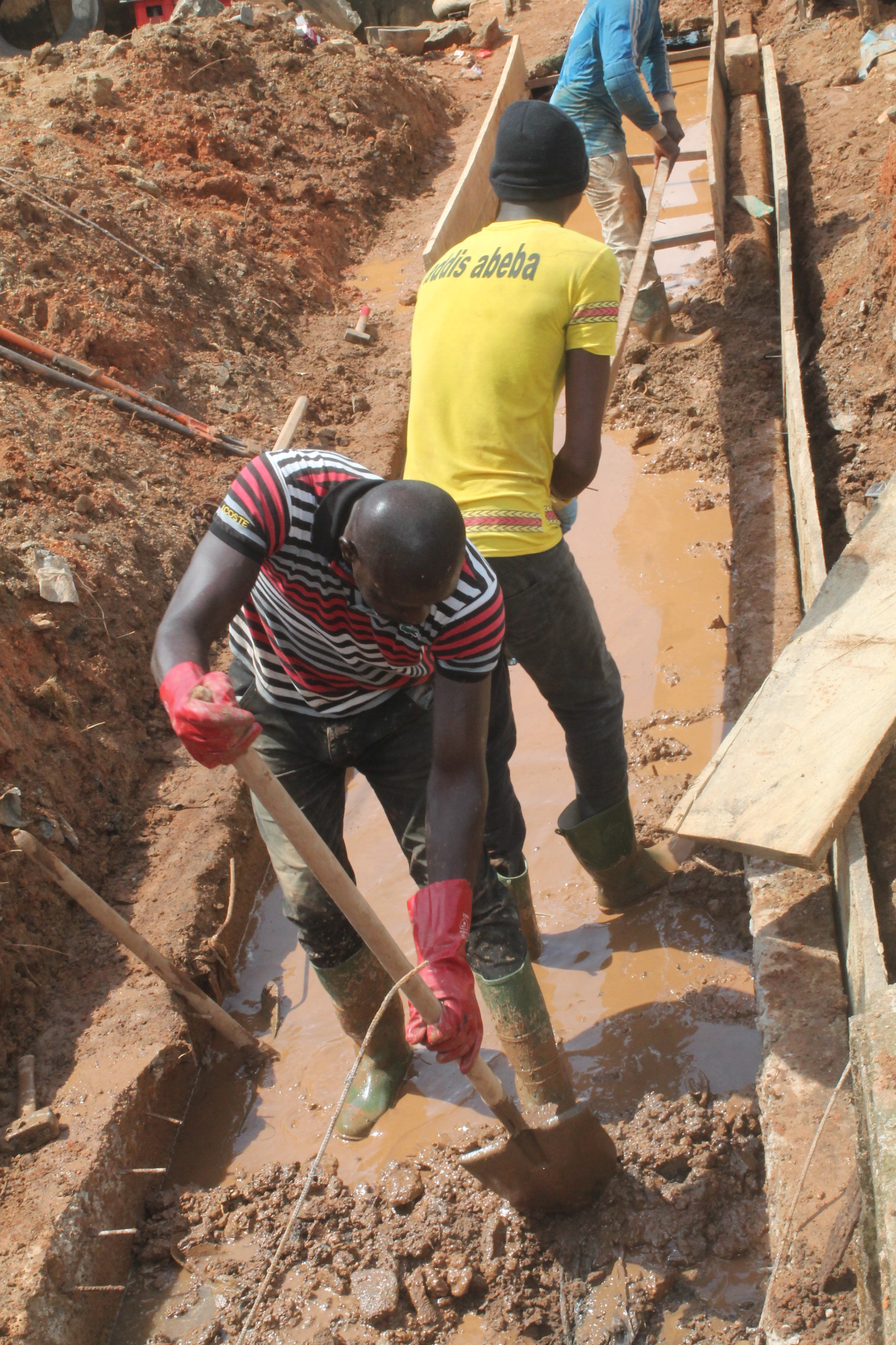 Aboisso en Chantier This is an image of "African people at work" from Ivory Coast